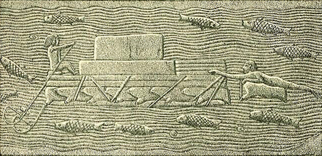 Darstellung eines assyrischen Keleks. Zeichnung nach einem Relief in Ninive Uploaded with Reworkhelper